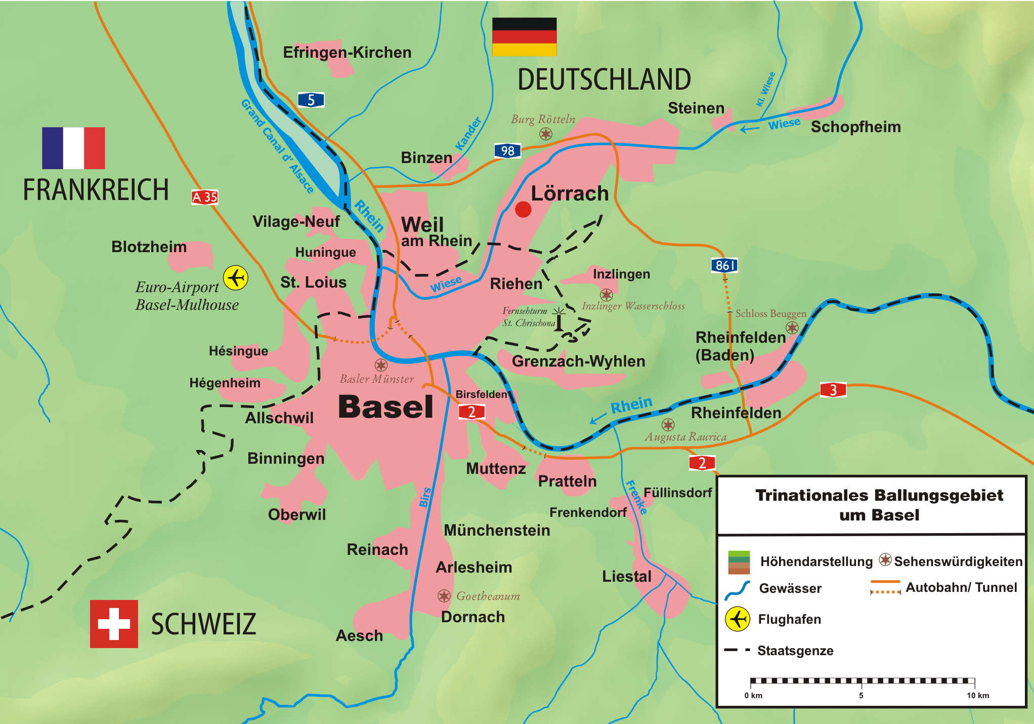 Karte des Großraums Basel